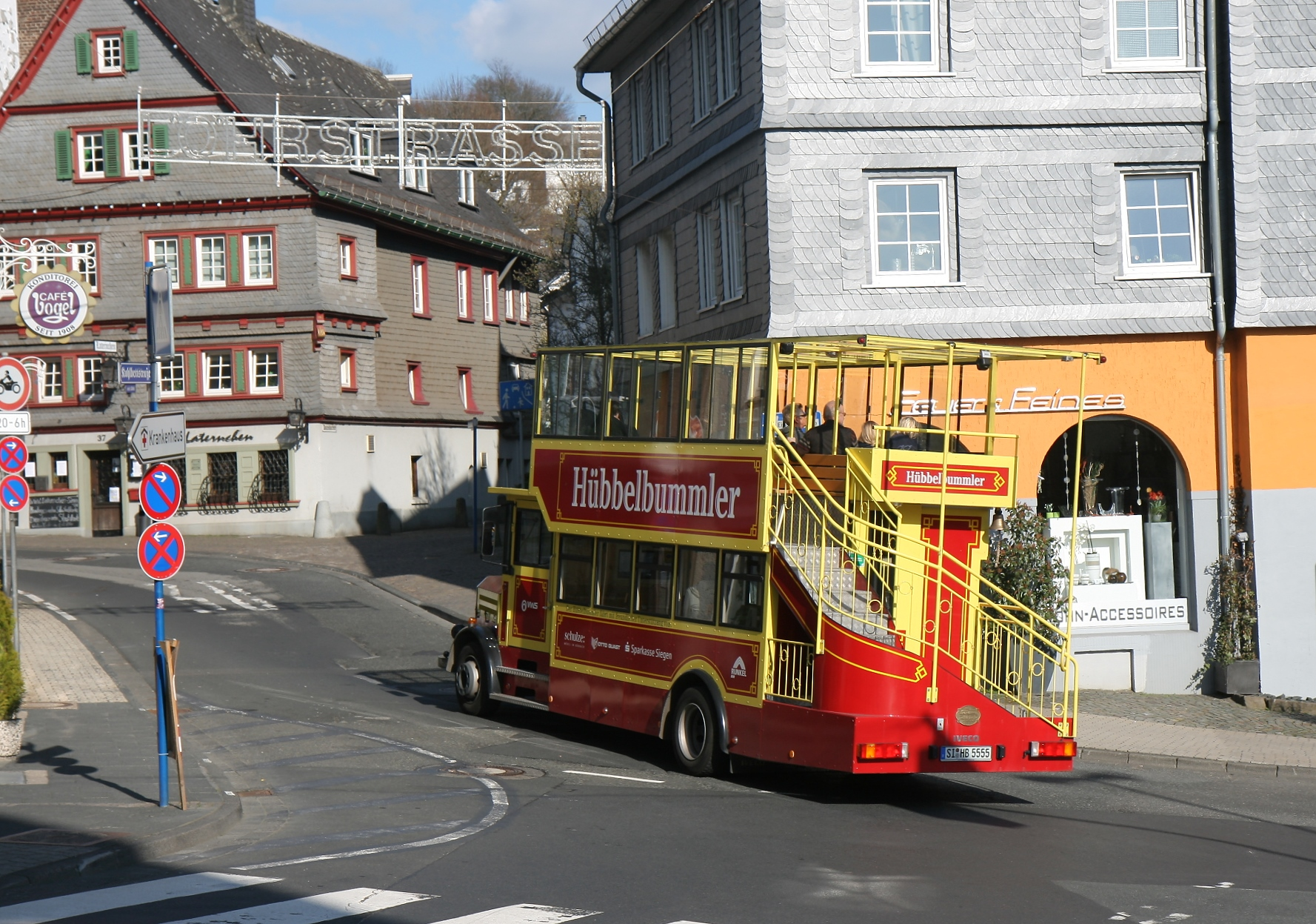 Stadtbus Hübbelbummler auf dem Weg zur Oberstadt (Oberes Schloss) in Siegen.